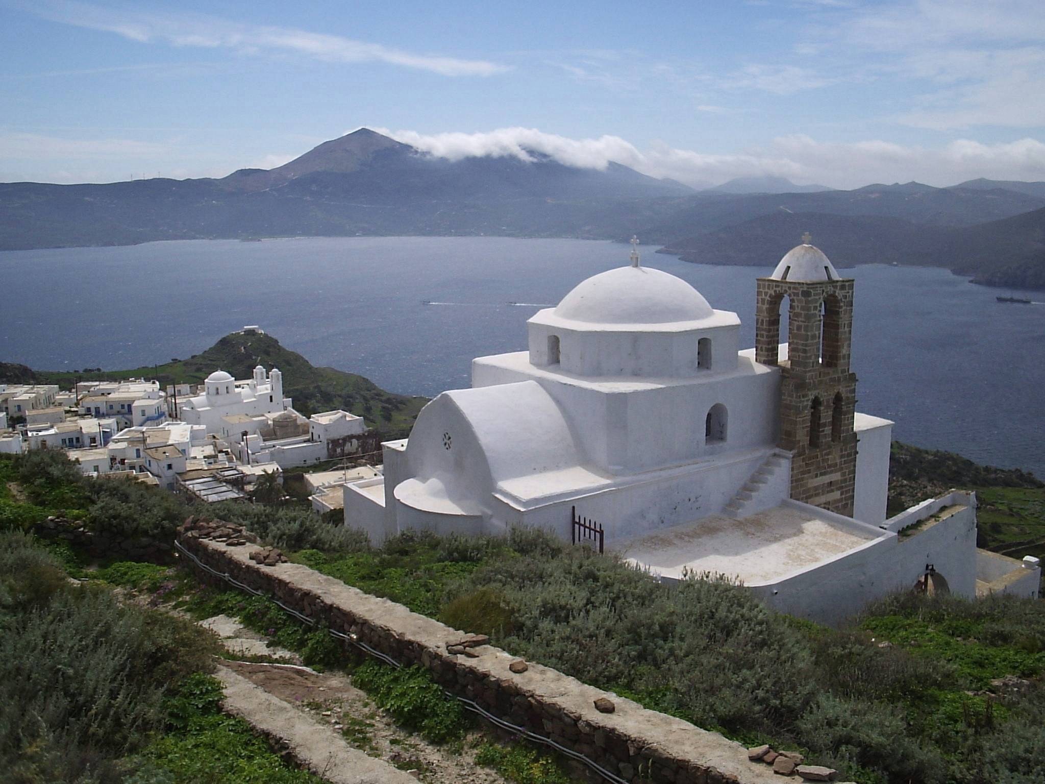 Η εκκλησία της "Θαλασσίτρας" στο Κάστρο (Πλάκα Μήλου)